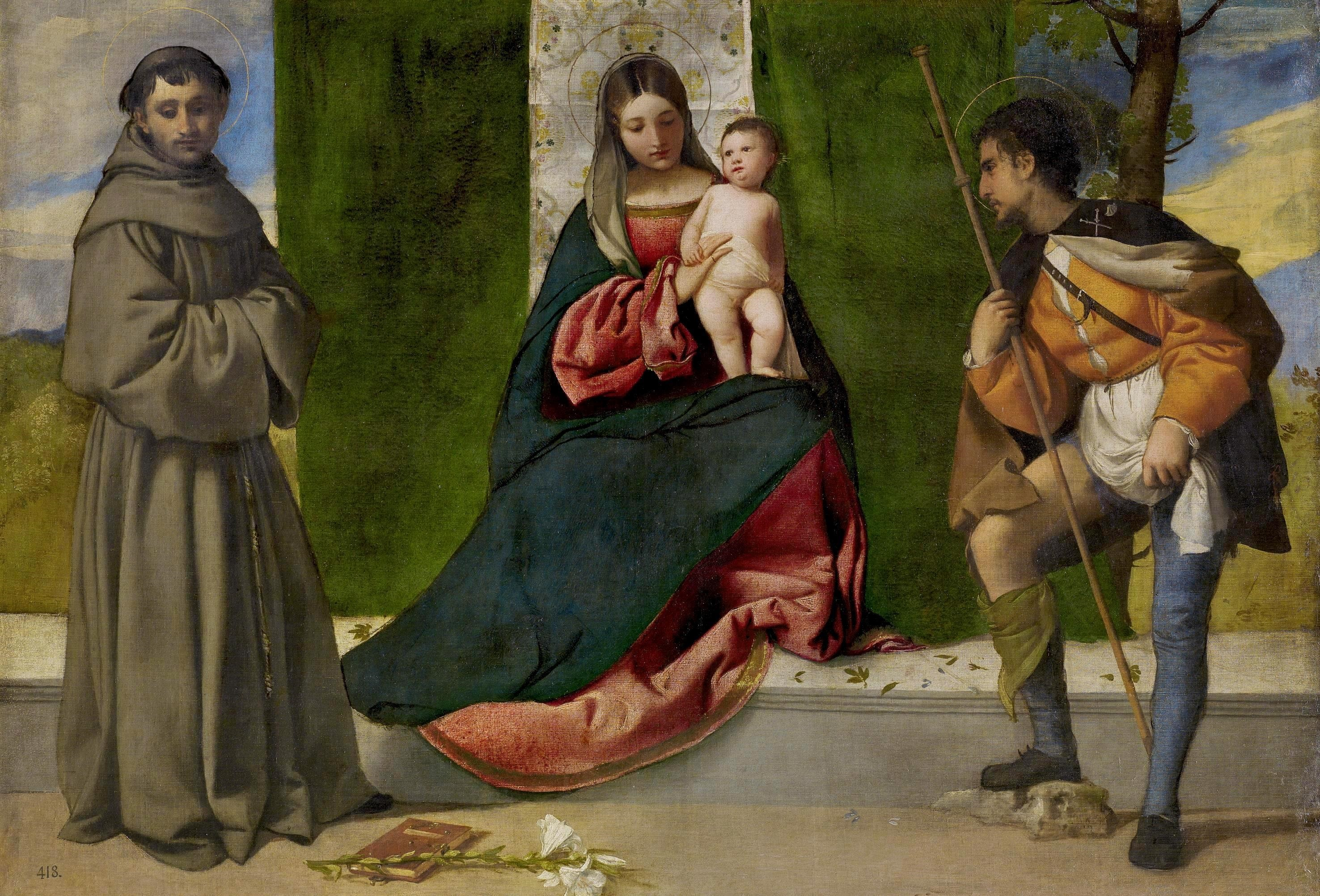 La obra representa a la Virgen María, que aparece sentada en un trono y llevando al Niño Jesús, entre San Antonio de Padua y San Roque.